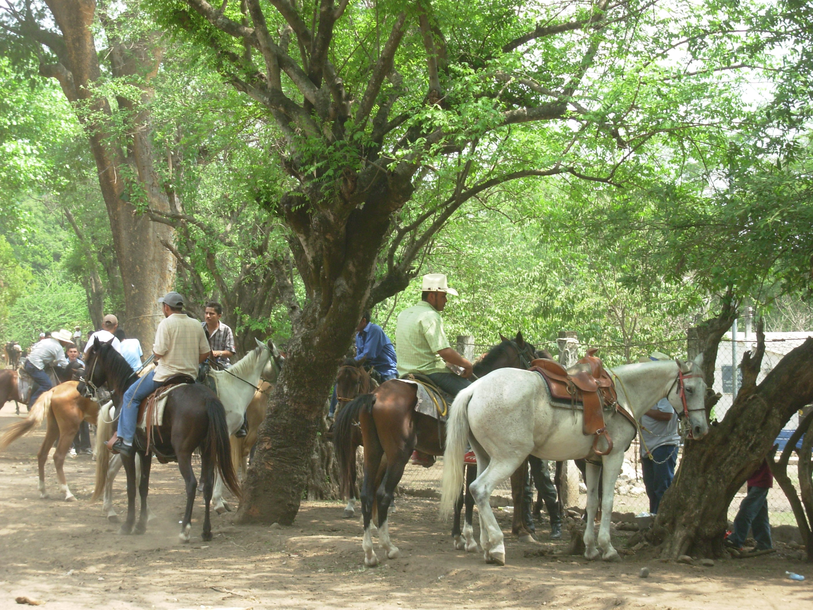 Fiesta en canton El Ahuacate,Quezaltepeque.